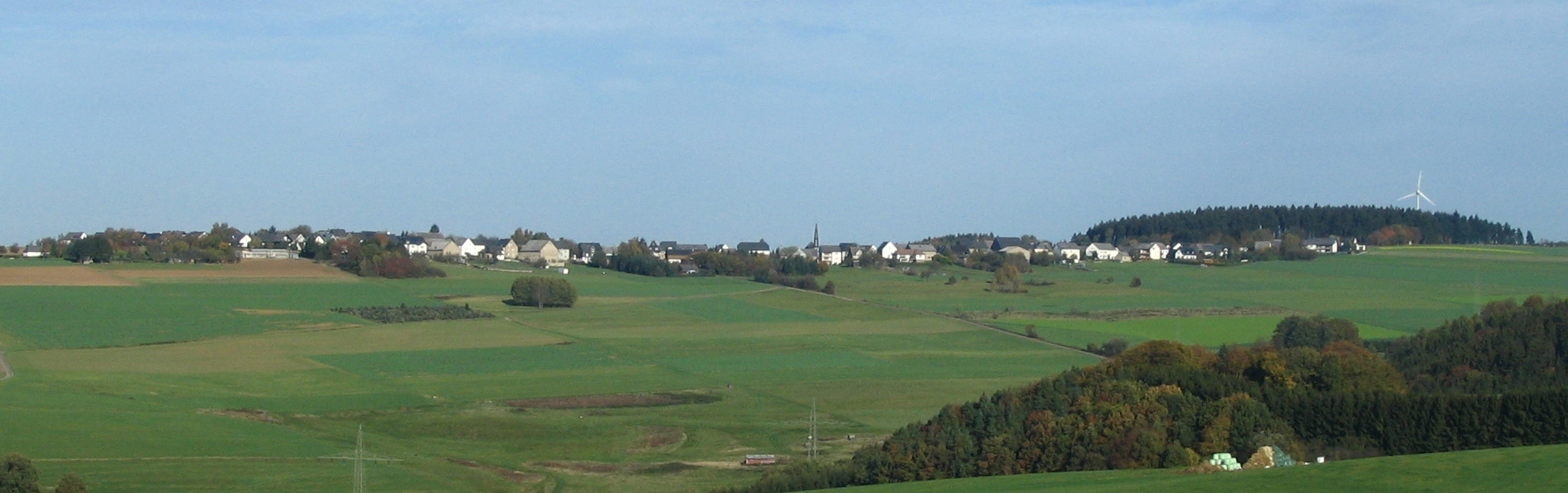 Löffelschied im Hunsrück